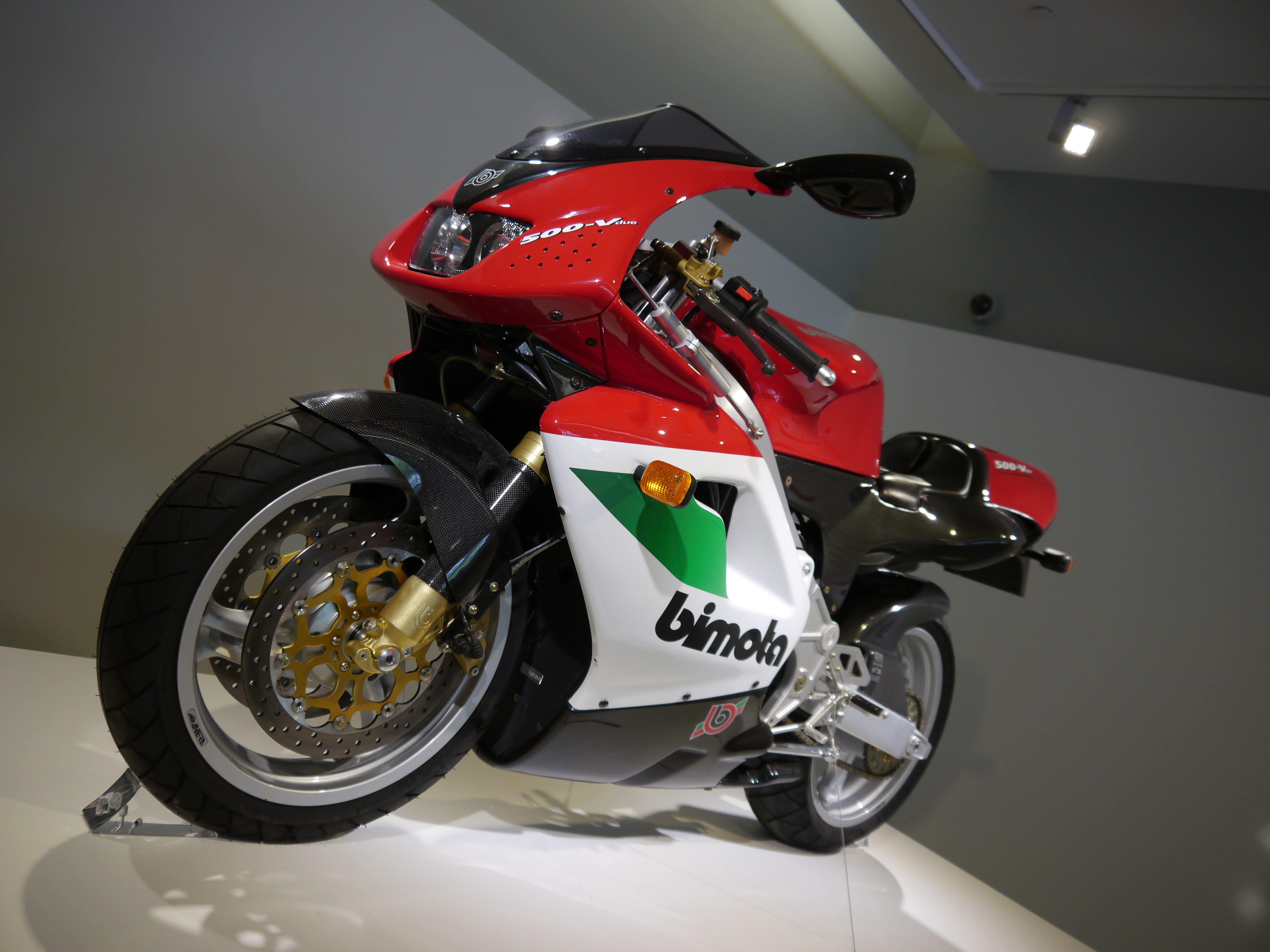 Bimota 500 V-Due